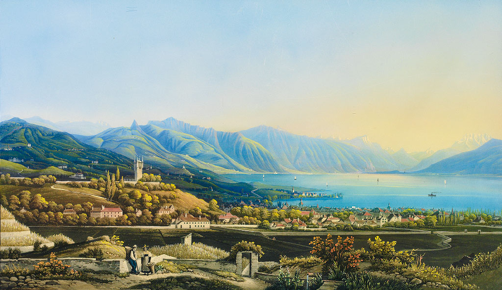 Johann Ludwig Bleuler (1792–1850): Blick auf Vevey am Genfer See. Gouache. 34 x 58,5 cm